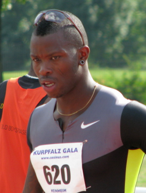 Reto Amaru Schenkel beim DLV-Olympia-Testwettkampf 2012 im Sepp-Herberger-Stadion Weinheim.